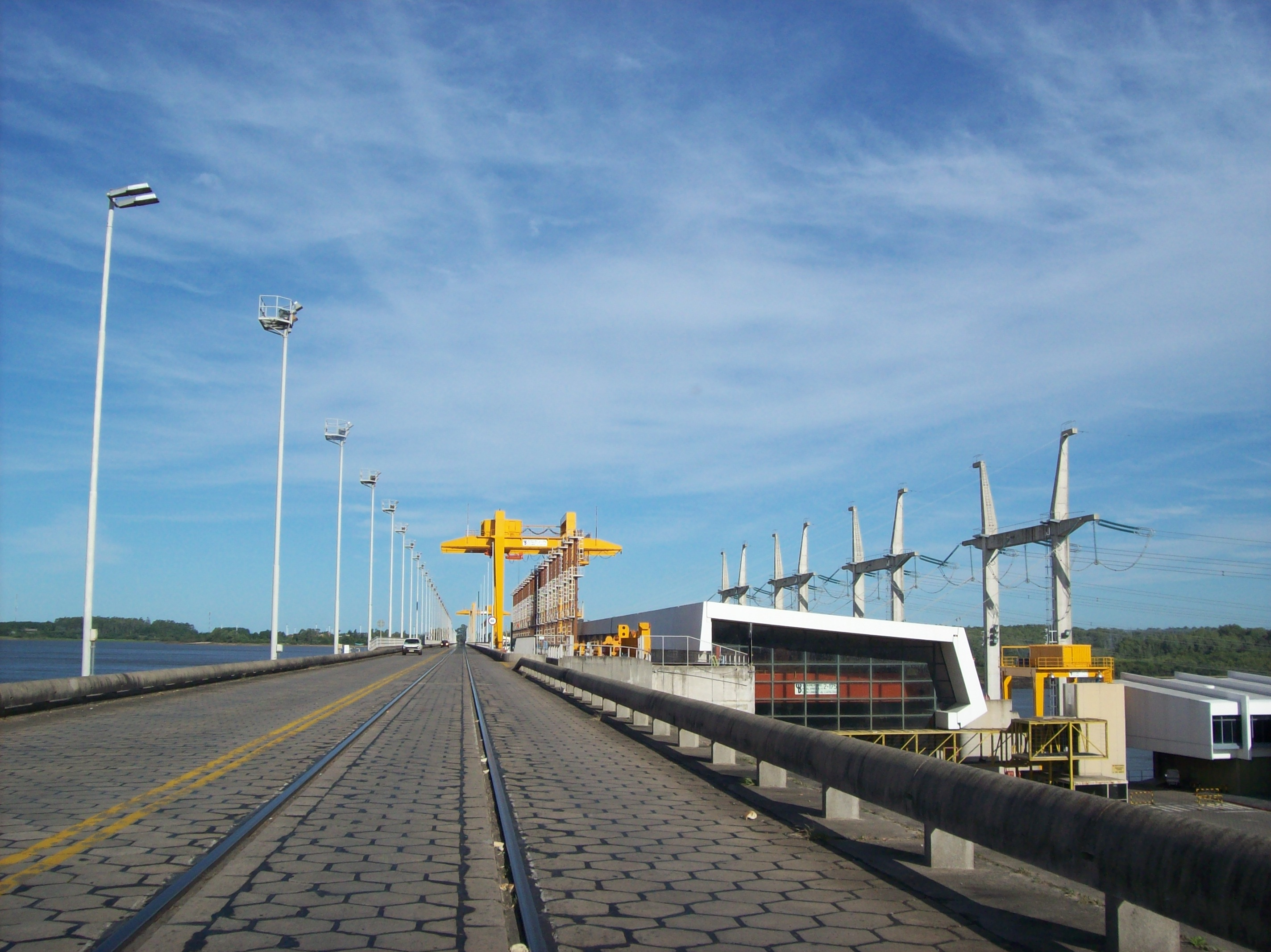 Puente Salto Grande sobre el Río Uruguay, entre Concordia, Argentina, y Salto, Uruguay. En el fondo, territorio uruguayo.